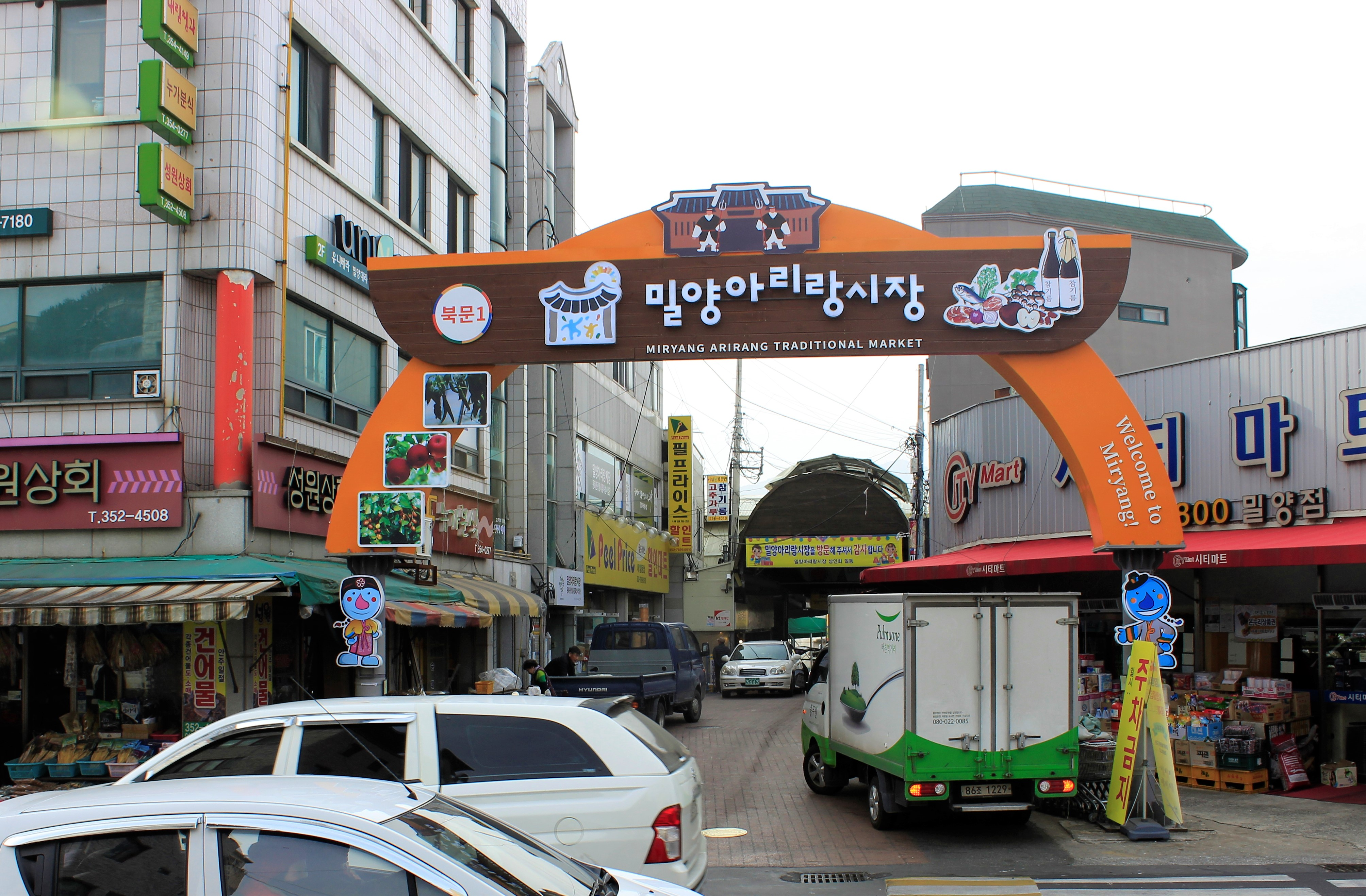 대한민국 경남 밀양시의 밀양아리랑시장